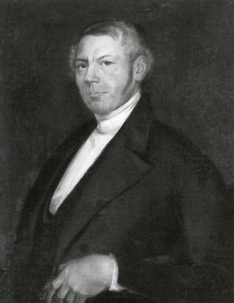 Jan Wilem Schuttevaer